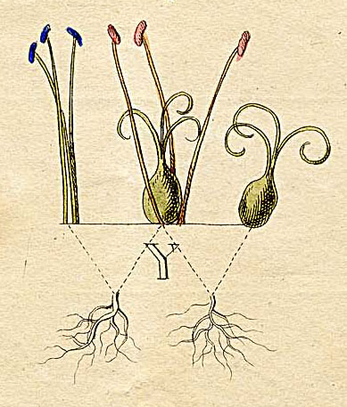 Ausschnitt (Klasse XXIII) aus Ehrets Tafel "Methodus Plantarum Sexualis"